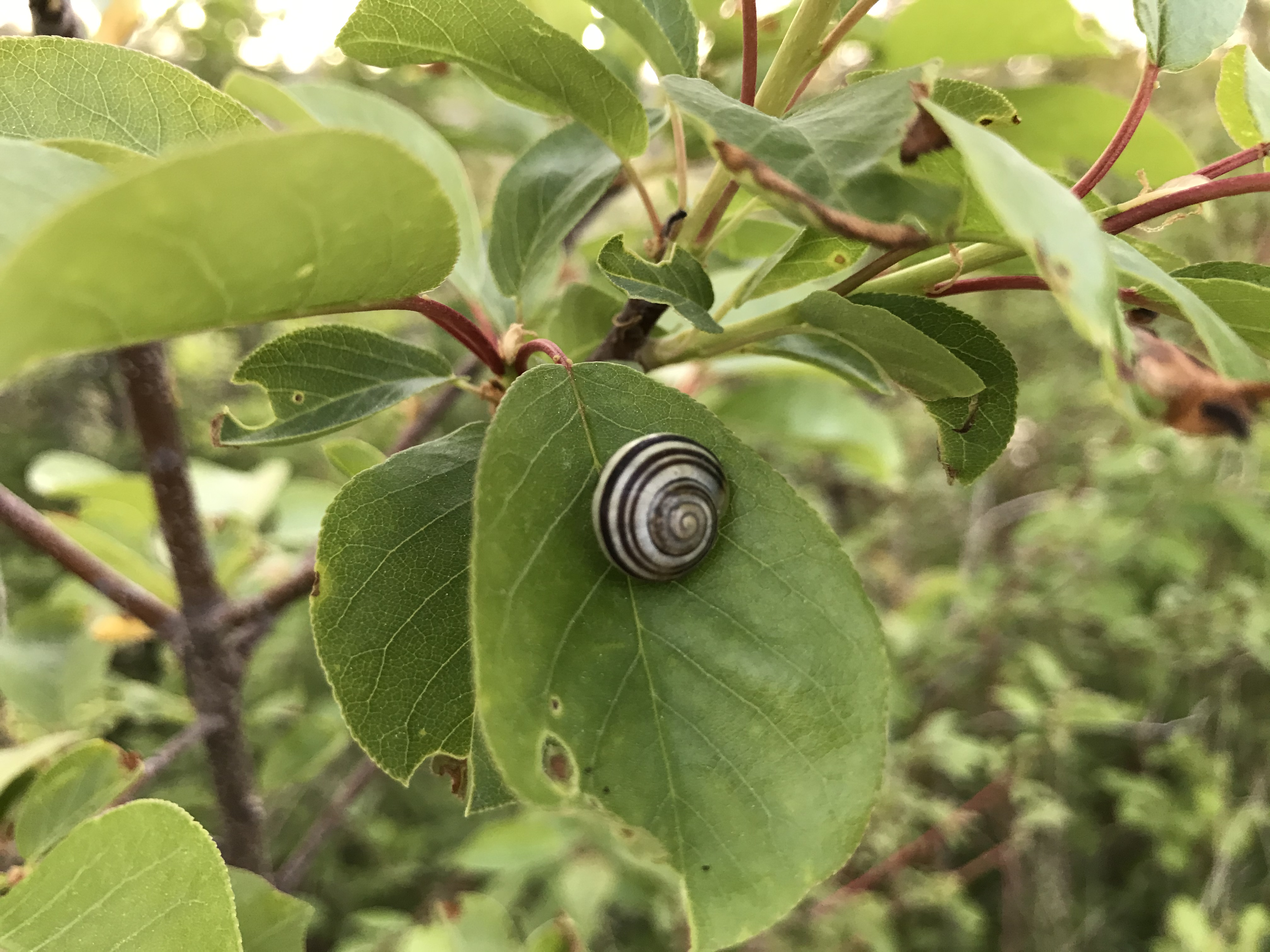 کوردی: سڕبوونی هاوینە